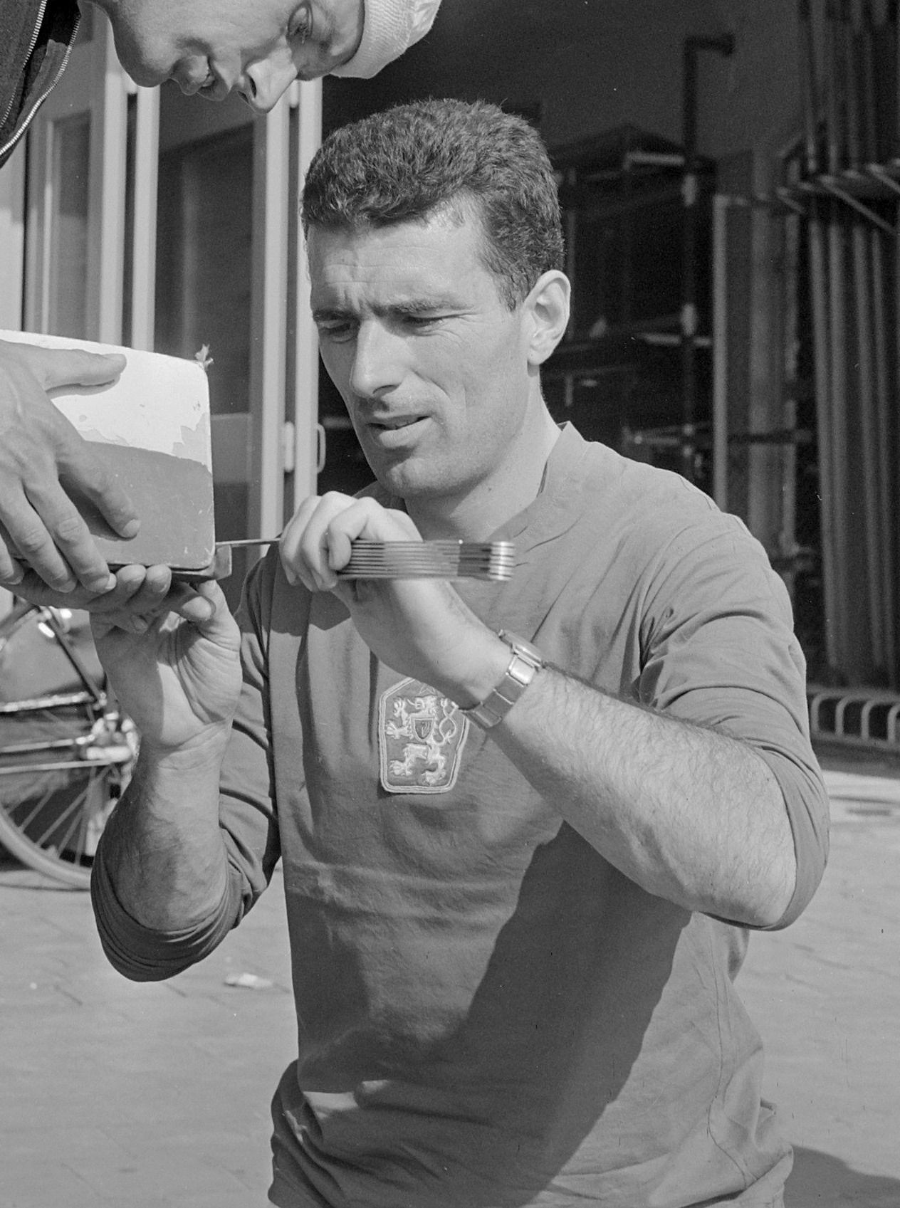 Training Europese roeikampioenschappen, de Tjechische skiffeur werkt aan zijn boot, links Rob Groen